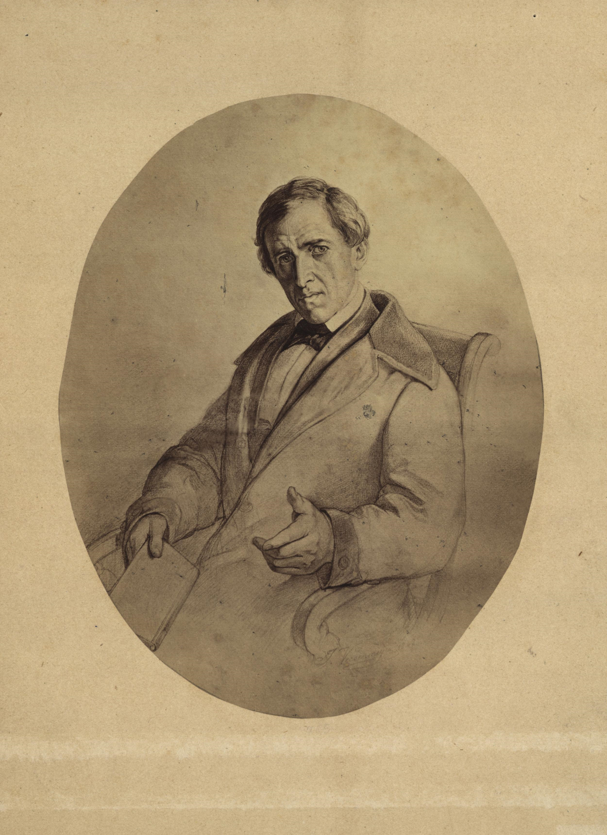 Portrait David Friedrich Strauß, Bleistiftzeichnung